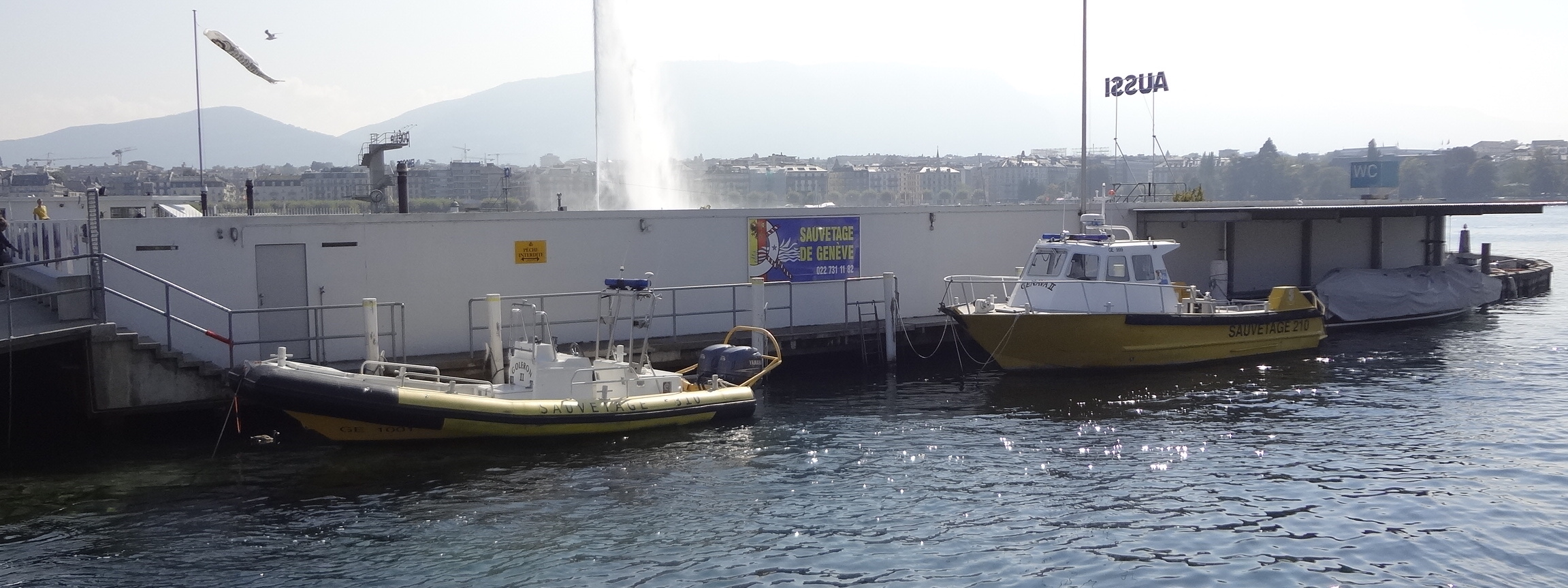 Bateaux de la société de Sauvetage de Genève à la jetée des Pâquis, membre de la Société Internationale de Sauvetage du Léman (SISL, franco-suisse, 34 sociétés en 2016, bénévoles). Une vedette avec cabine et une unité d’intervention rapide avec boudins.